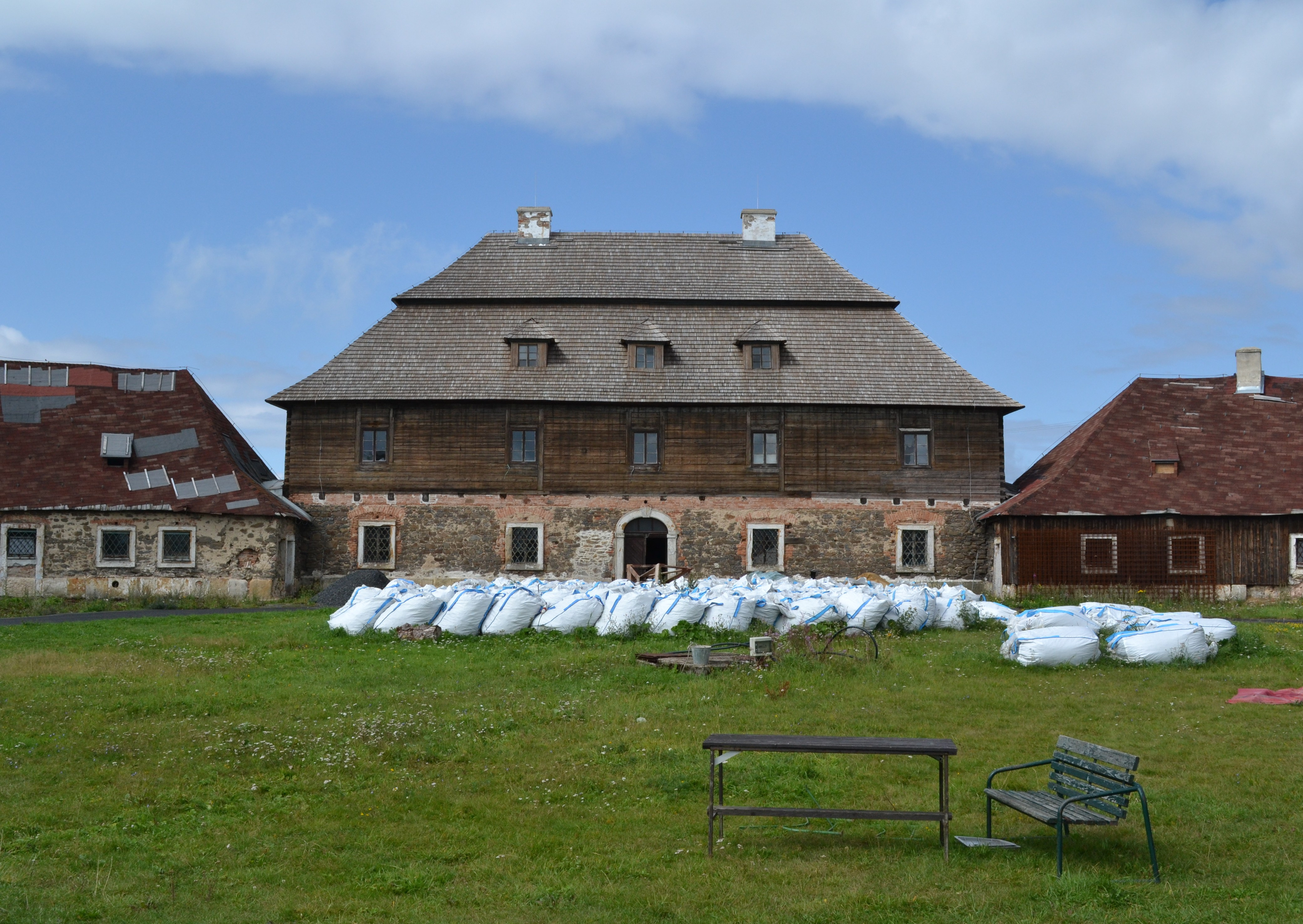 Český Jiřetín - zámeček Lichtenwald